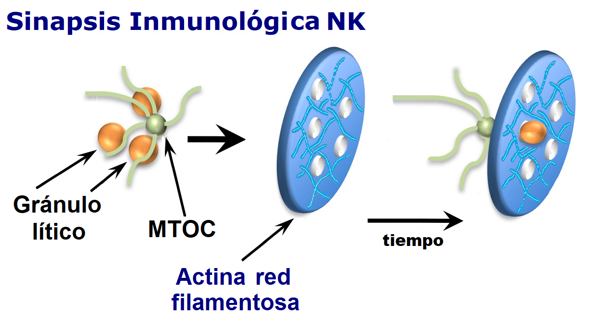 Figura 7.C_ Aproximación de organelos del tamaño de gránulos líticos con y dentro de las redes de actina cortical. Sinapsis inmunológica de la célula NK. Modelo propuesto de la administración de gránulos.